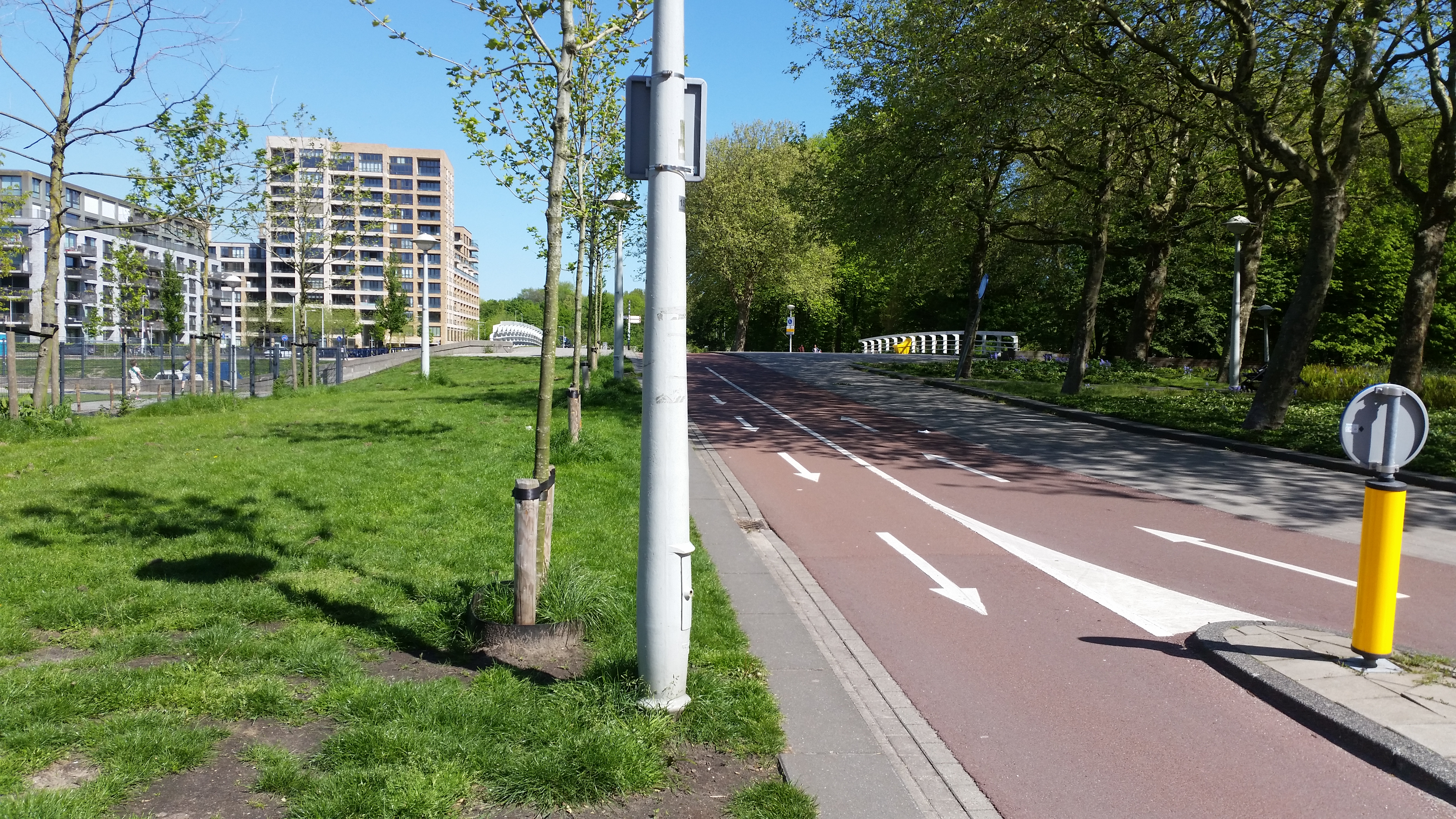 Brug 695 te zien in de lengte, brede brug over Westlandgracht, Amsterdam